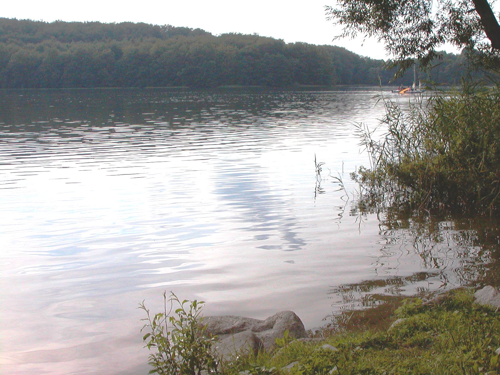 Jezioro Ostrzyckie w Ostrzycach (Kaszuby).